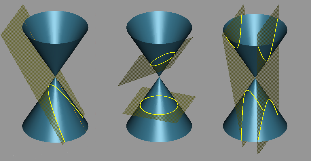 konikoj sen subskriboj